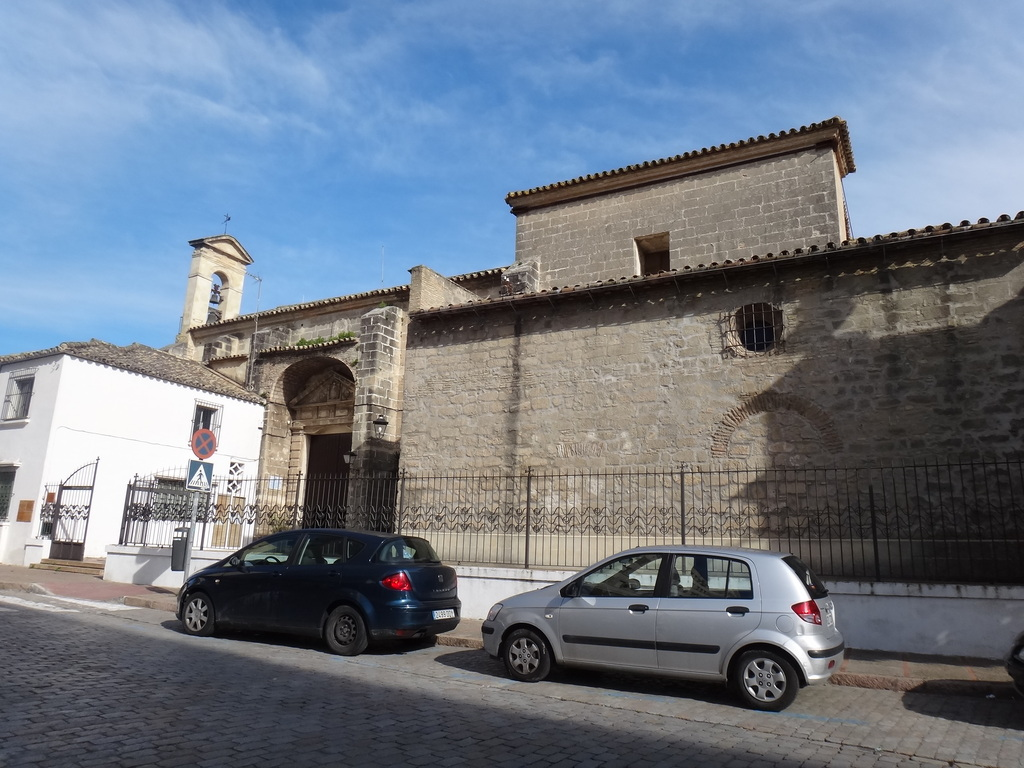 Parroquia de San Juan Bautista de los Descalzos y Nuestra Señora de las Angustias. Jerez de la Frontera (Andalucía, España)